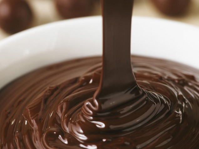 El ganaché de chocolate es ideal para recubrir tartas o ricas recetas de repostería.